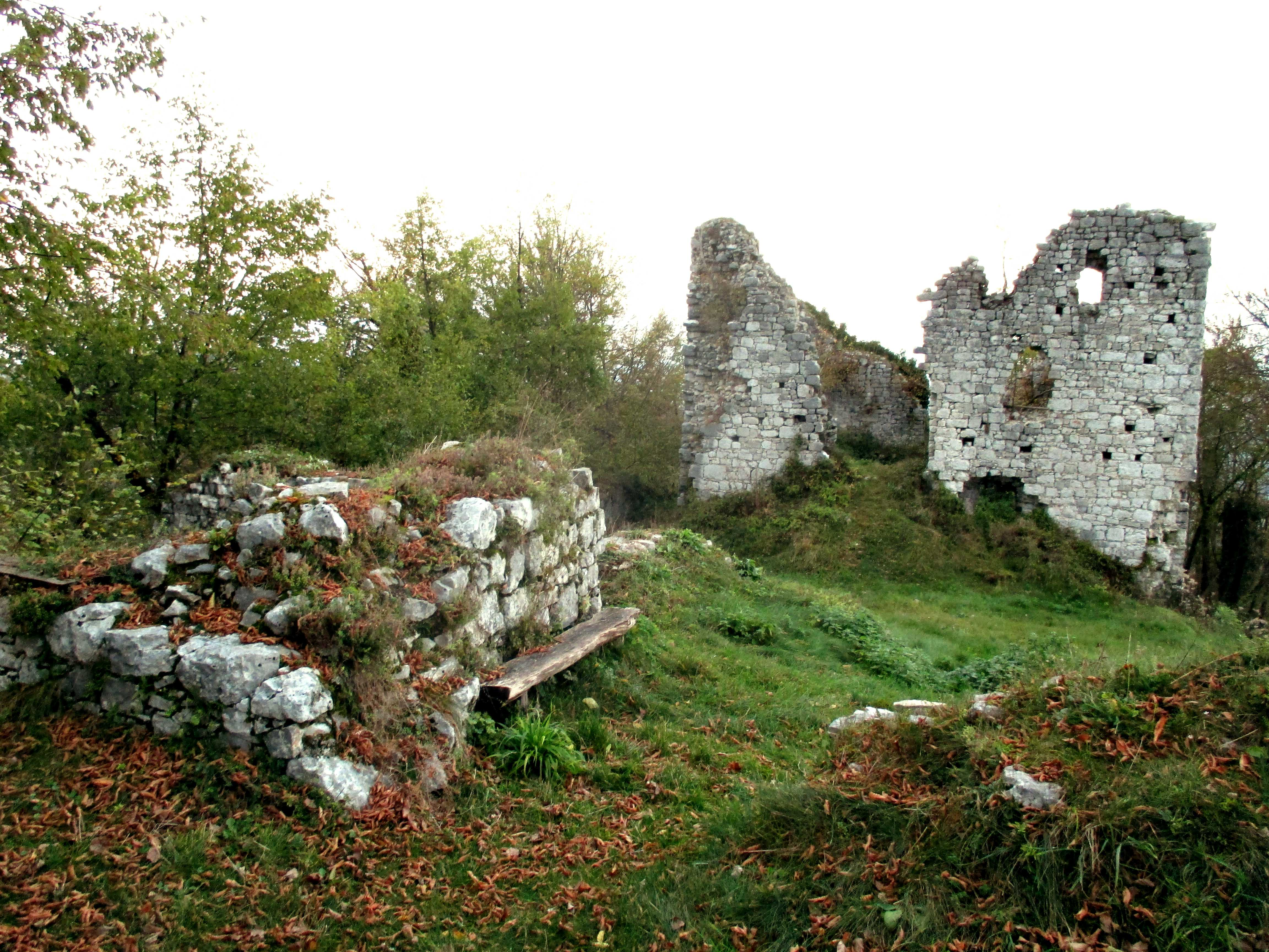 Ruševina gradu Šumberk 2014